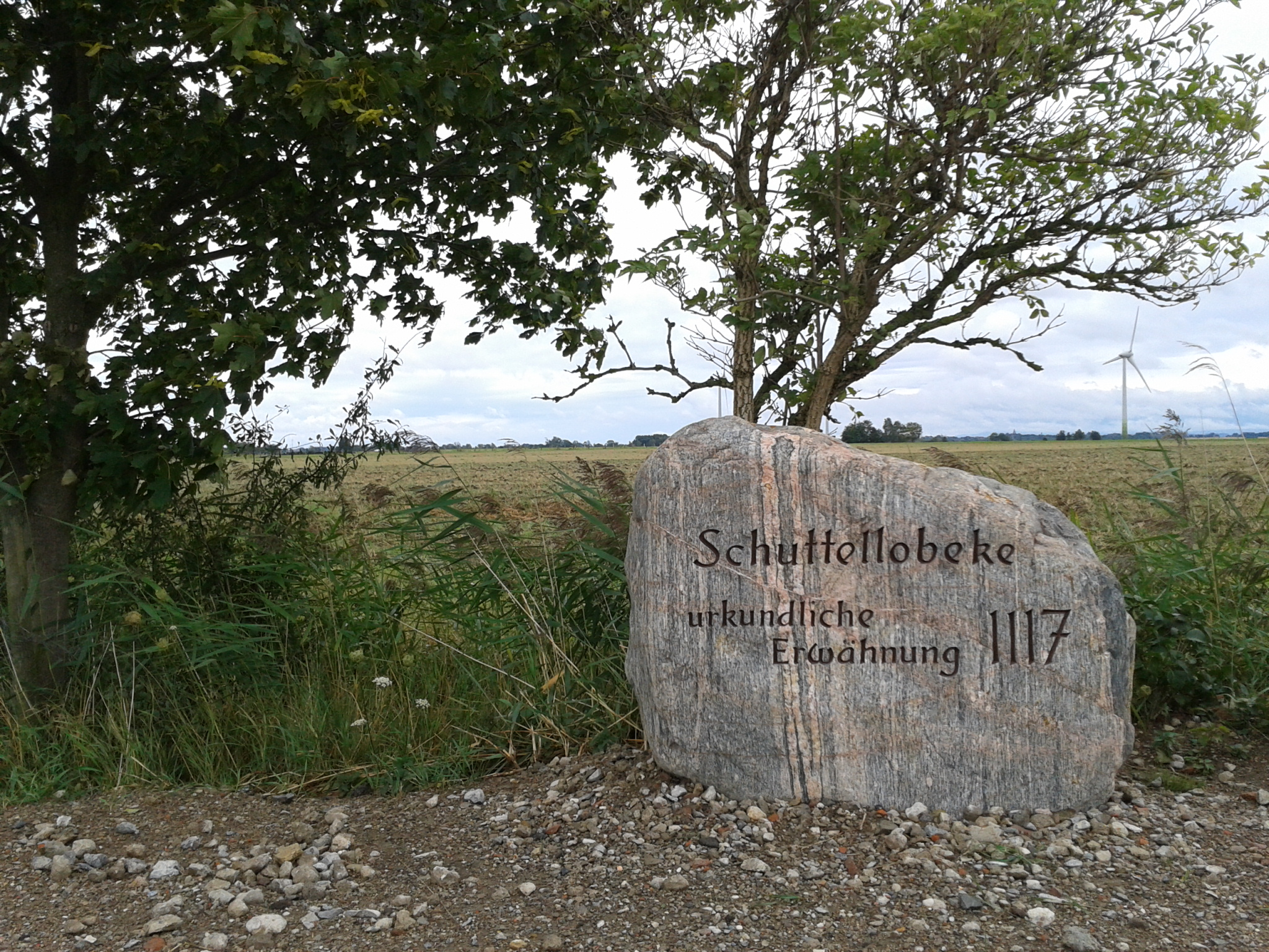 Gedenkstein an das Dorf Schuttellobeke, welches 1117 im Bereich der heutigen Stadt Sehnde existierte